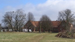 Gutshof-Gebäude in Vimfow